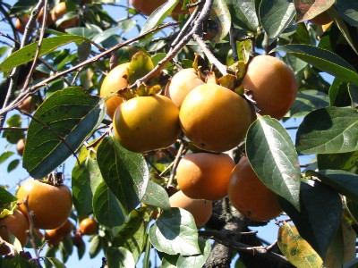 柿の実 撮影者：投稿者 撮影日：2004年10月2日